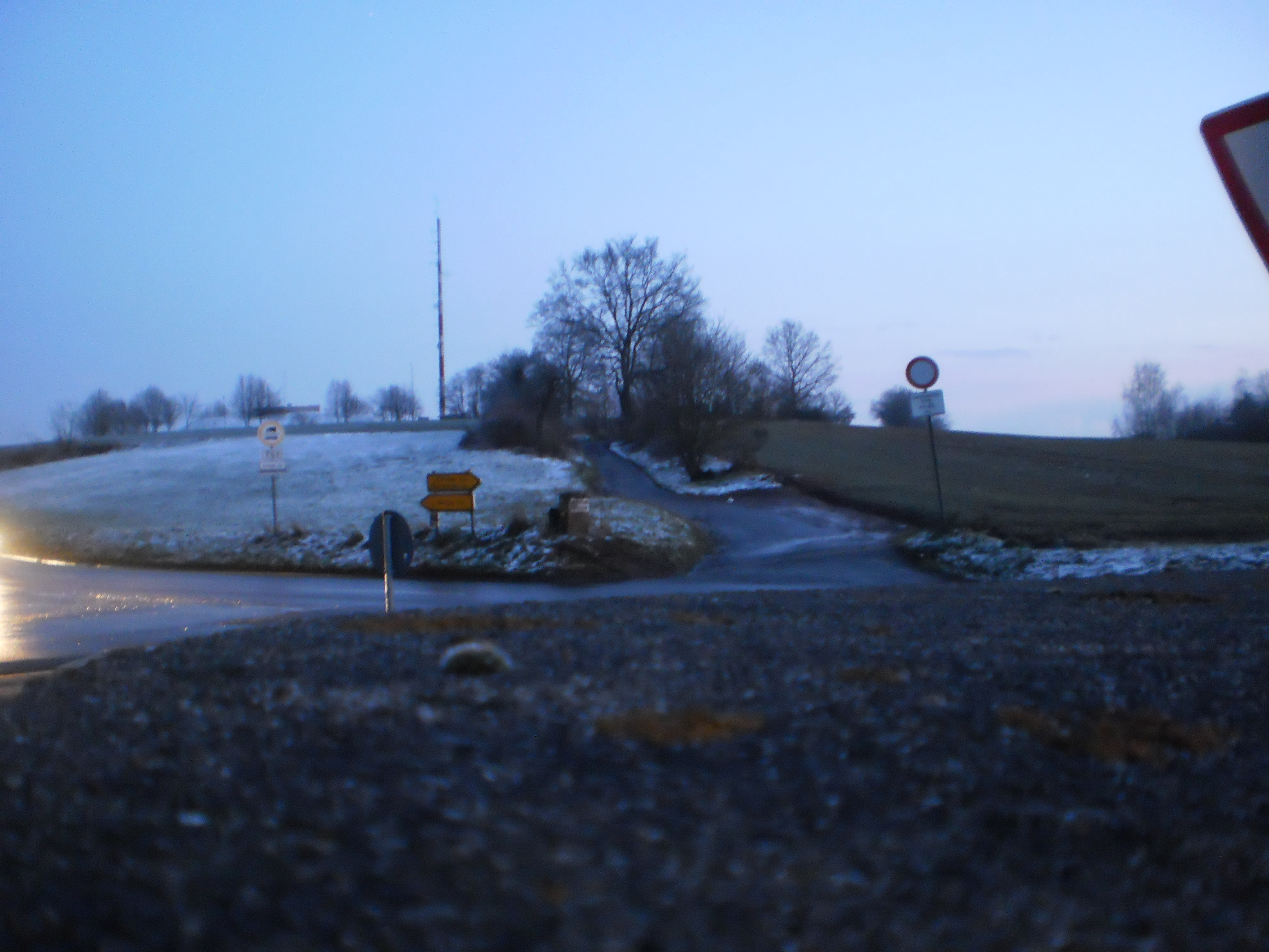 Wehrshäuser Höhe mit Funkmast auf dem Hauptkamm des Marburger Rückens. Im Vordergrund quert die Kreisstrasse K 72 Marburg-Wehrshausen, welche hier die Strasse Rotenberg hoch kommt, die historische Weinstrasse. Scheinwerferlicht in der beginnenden (kalten) Winternacht.